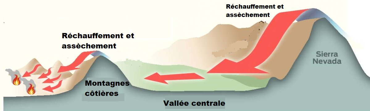 Réchauffement de l'air du Grand Bassin dans les Rocheuses américaines vers la vallée Centrale de Californie puis effet de foehn au-dessus des montagnes côtières dans le cas du Diablo.